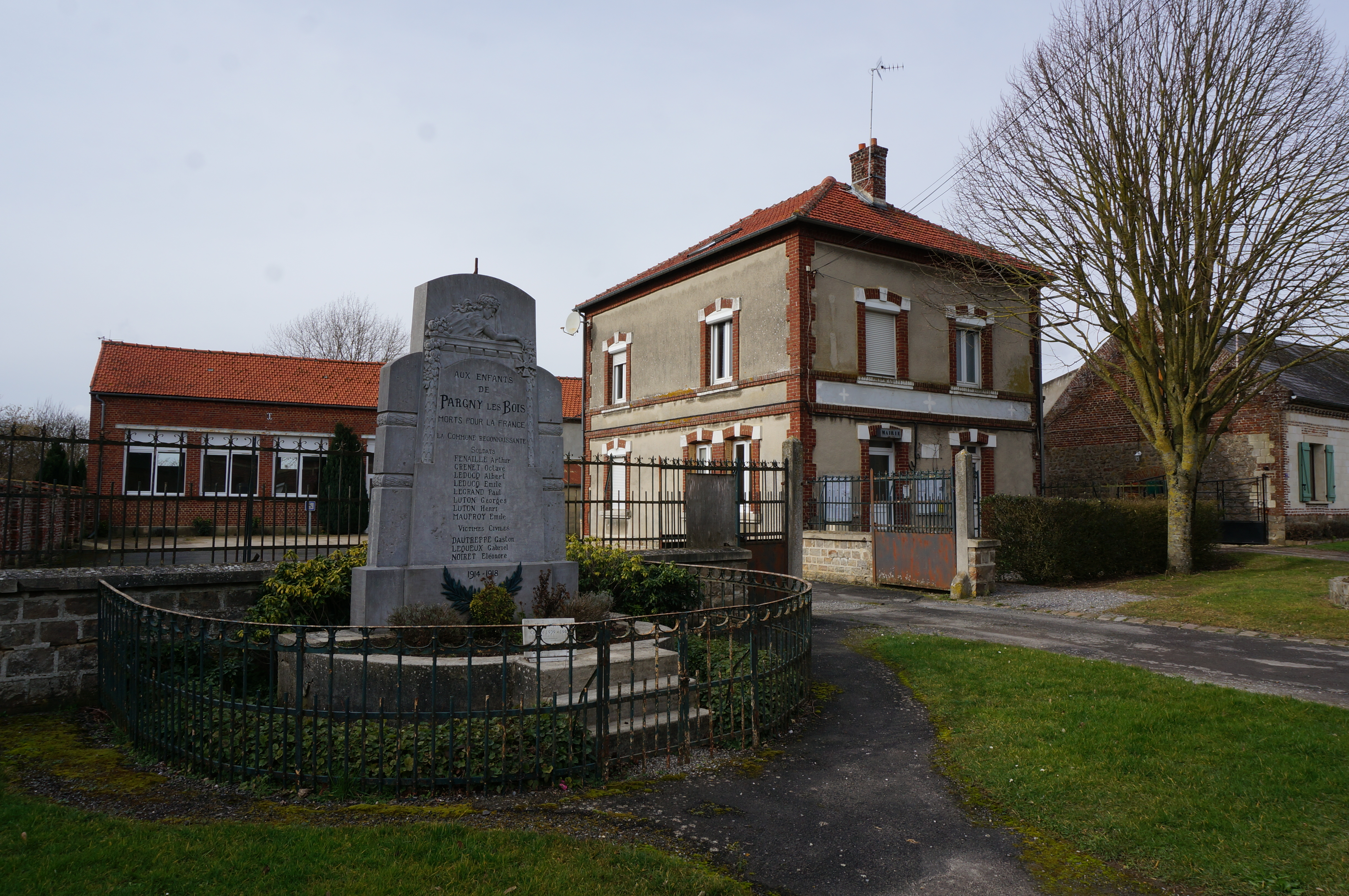 Vue de la commune de Pargny-les-Bois.